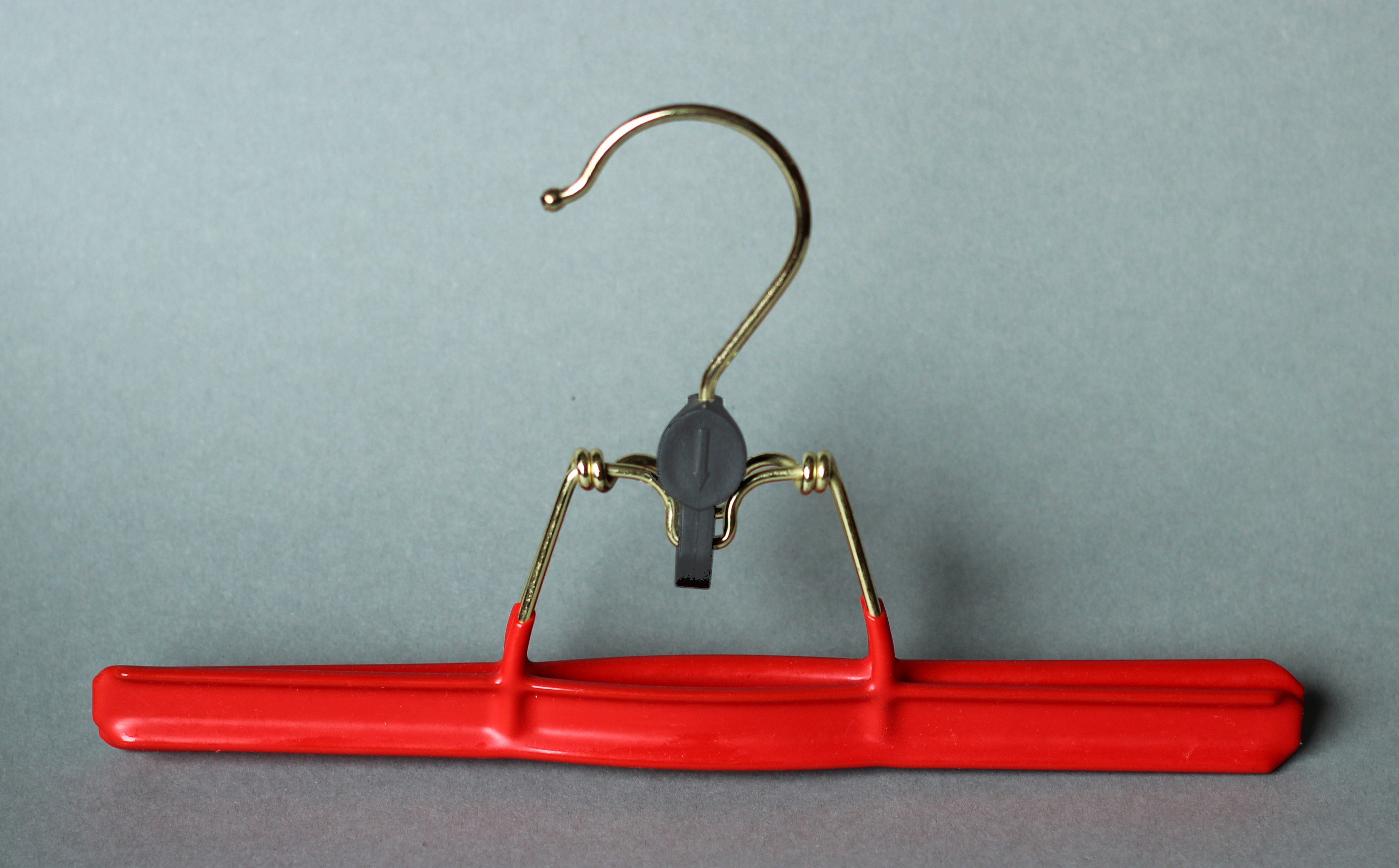 Bildinhalt: Roter Hosen-Klemmbügel Aufnahmeort: Baden-Baden, Deutschland